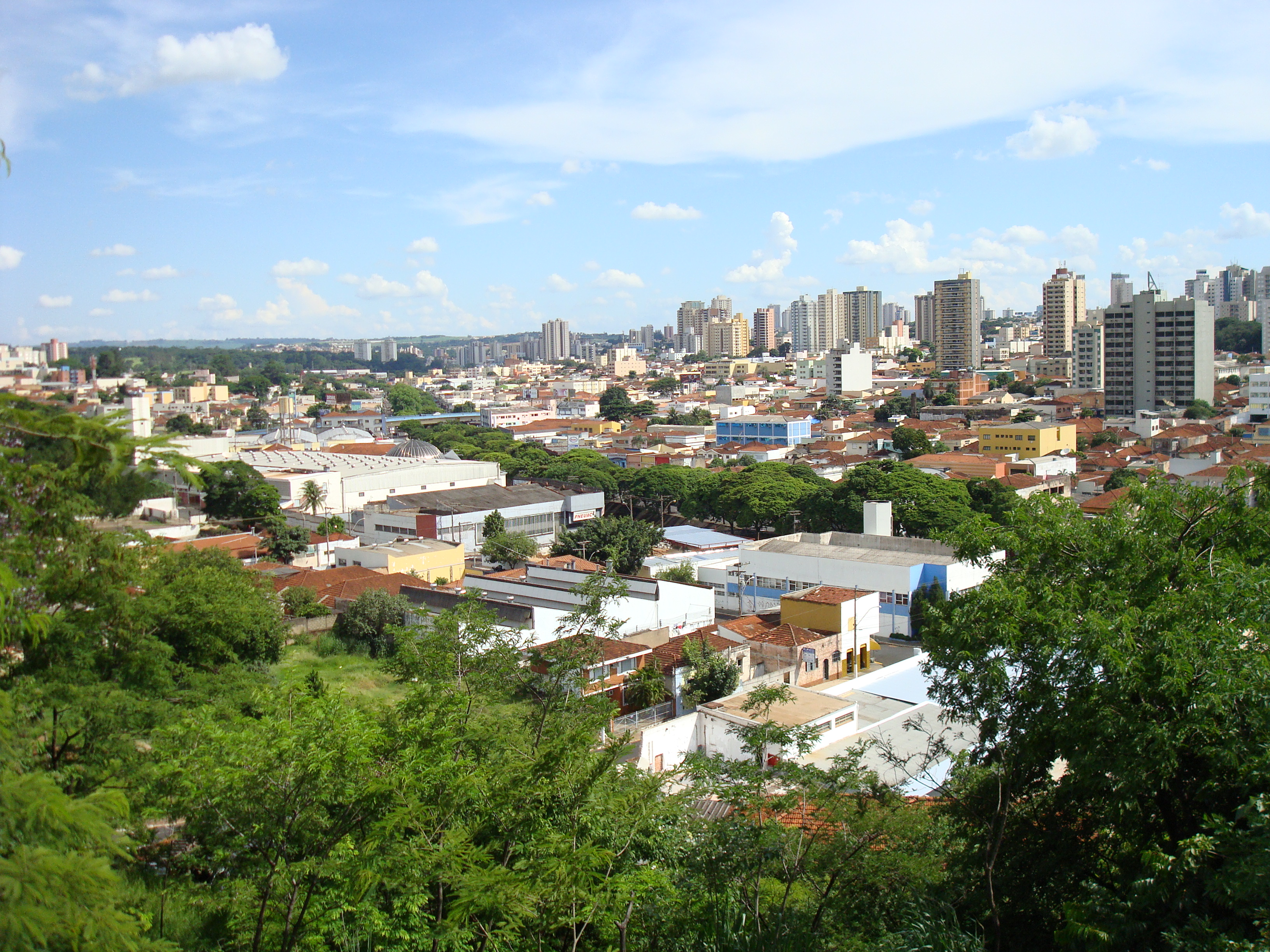 Vista de Ribeirao Preto do mirante do bosque municipal da cidade